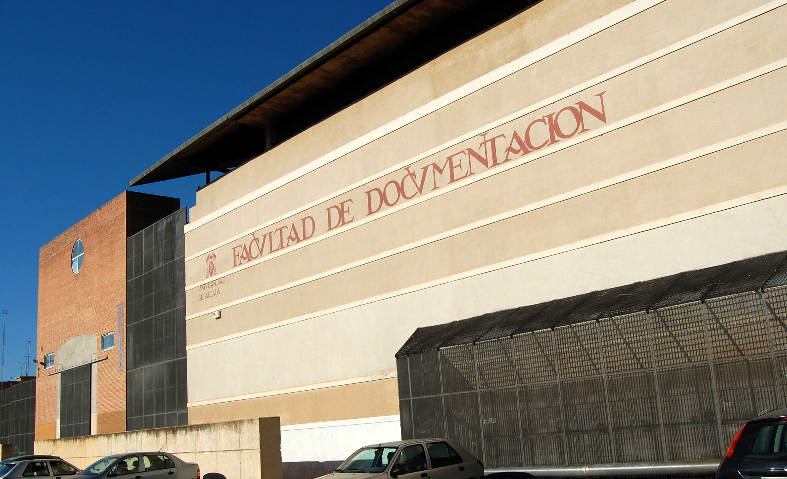 Archivo de la Universidad de Alcalá en el edificio de la antigua Facultad de Documentación en Alcalá de Henares (Comunidad de Madrid - España).